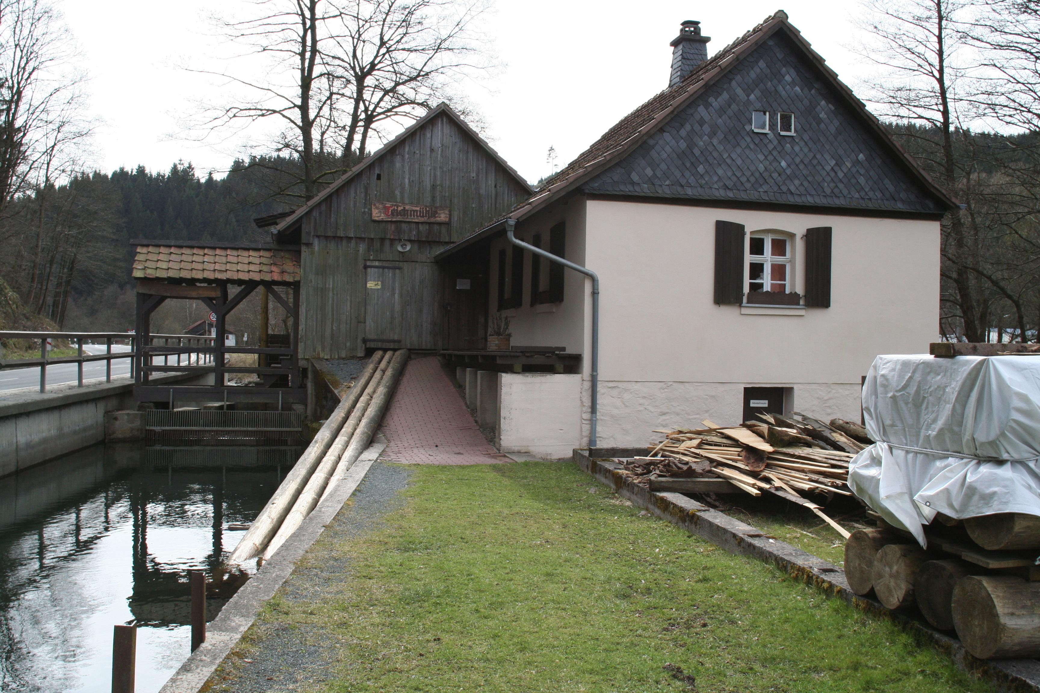 Steinwiesen im Landkreis Kronach, Teichmühle